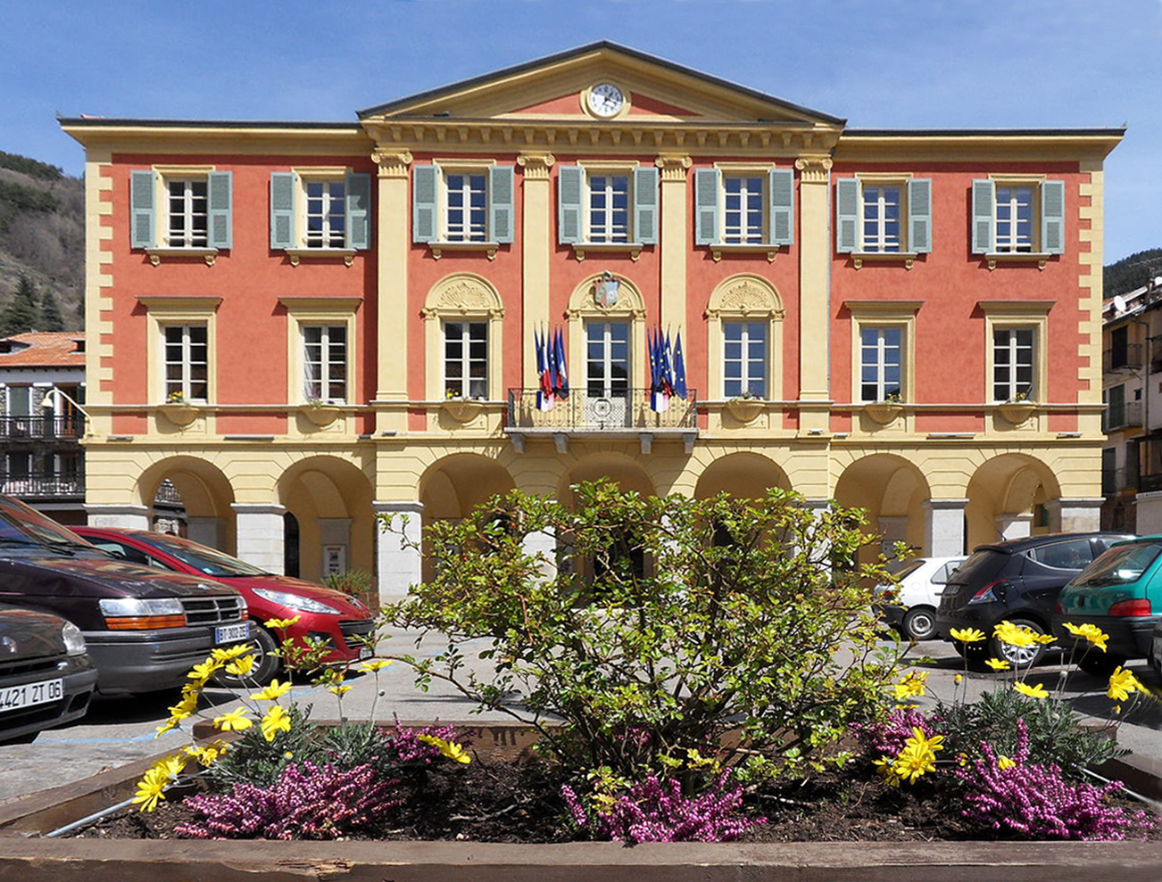 Saint-Martin-Vésubie. L'Hôtel de ville